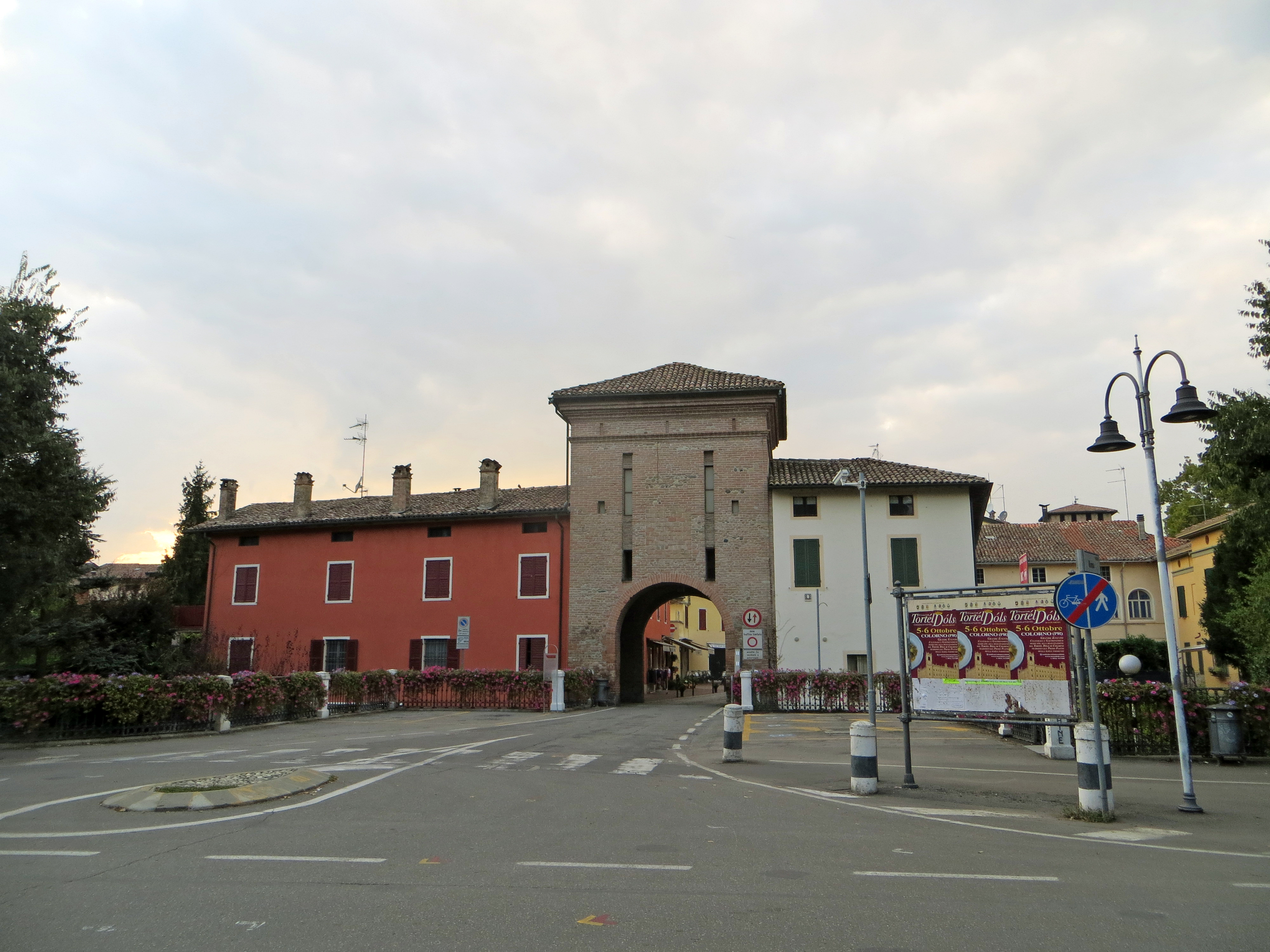 Porta di Sopra (Fontanellato) - lato esterno